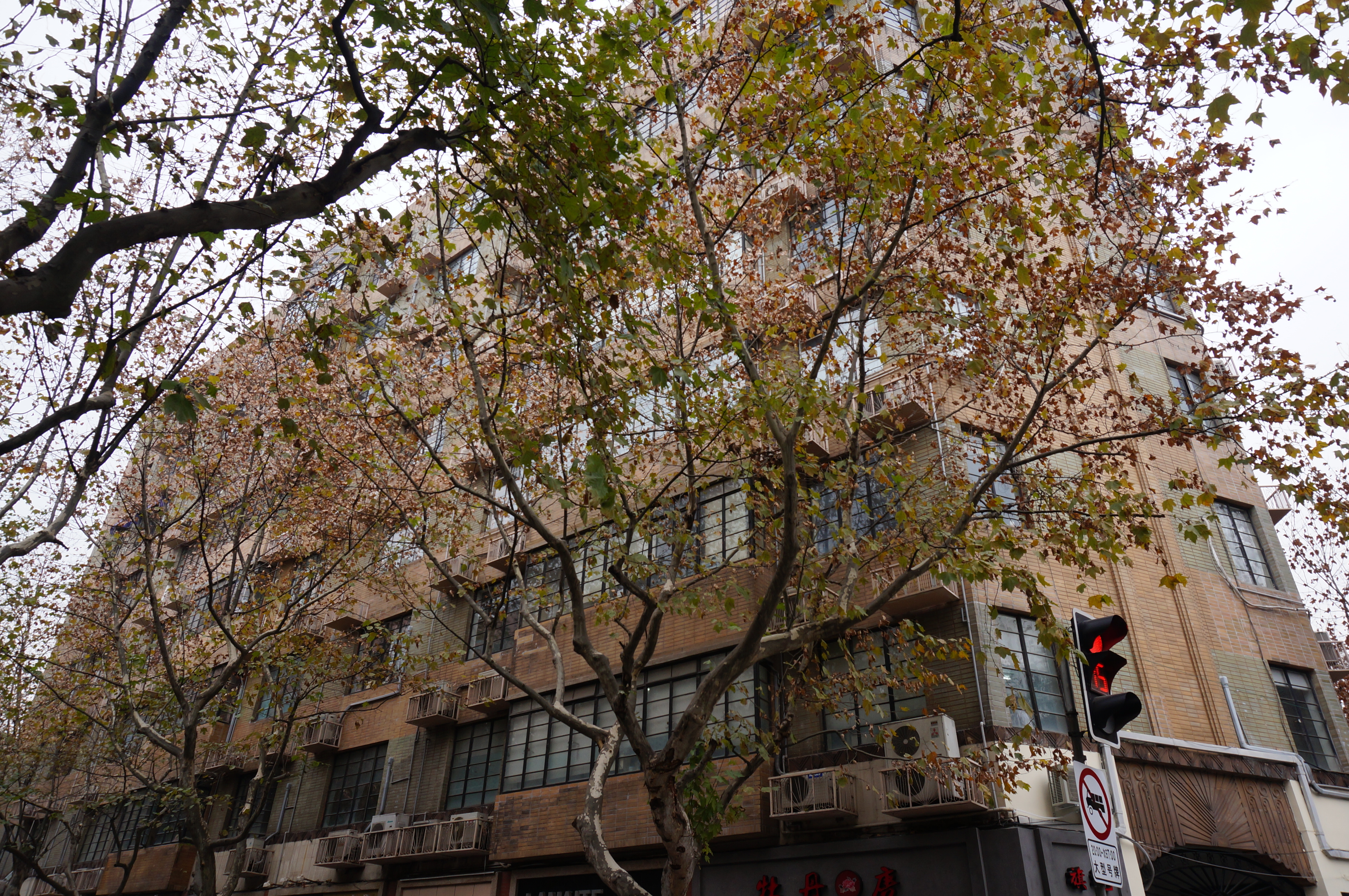 中文（中国大陆）: 南昌大楼侧景